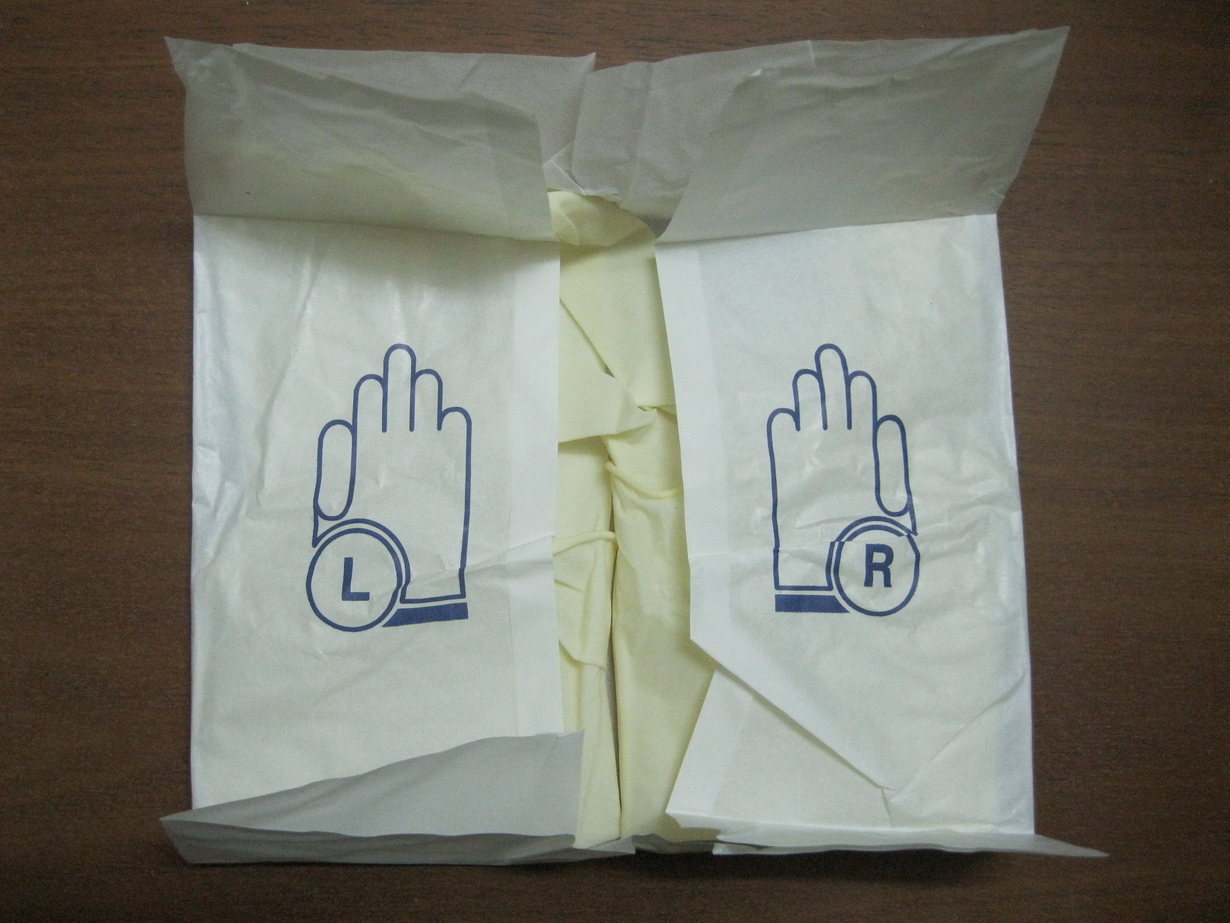 دستکش جراحی